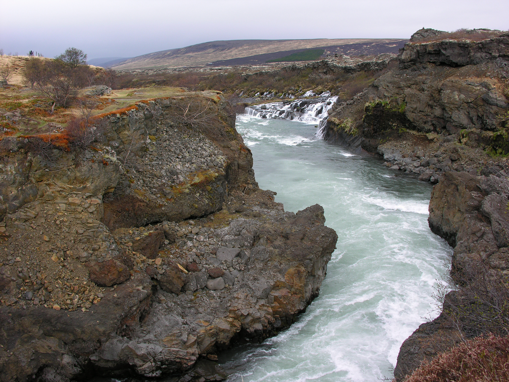 Iceland, Hraunfossar